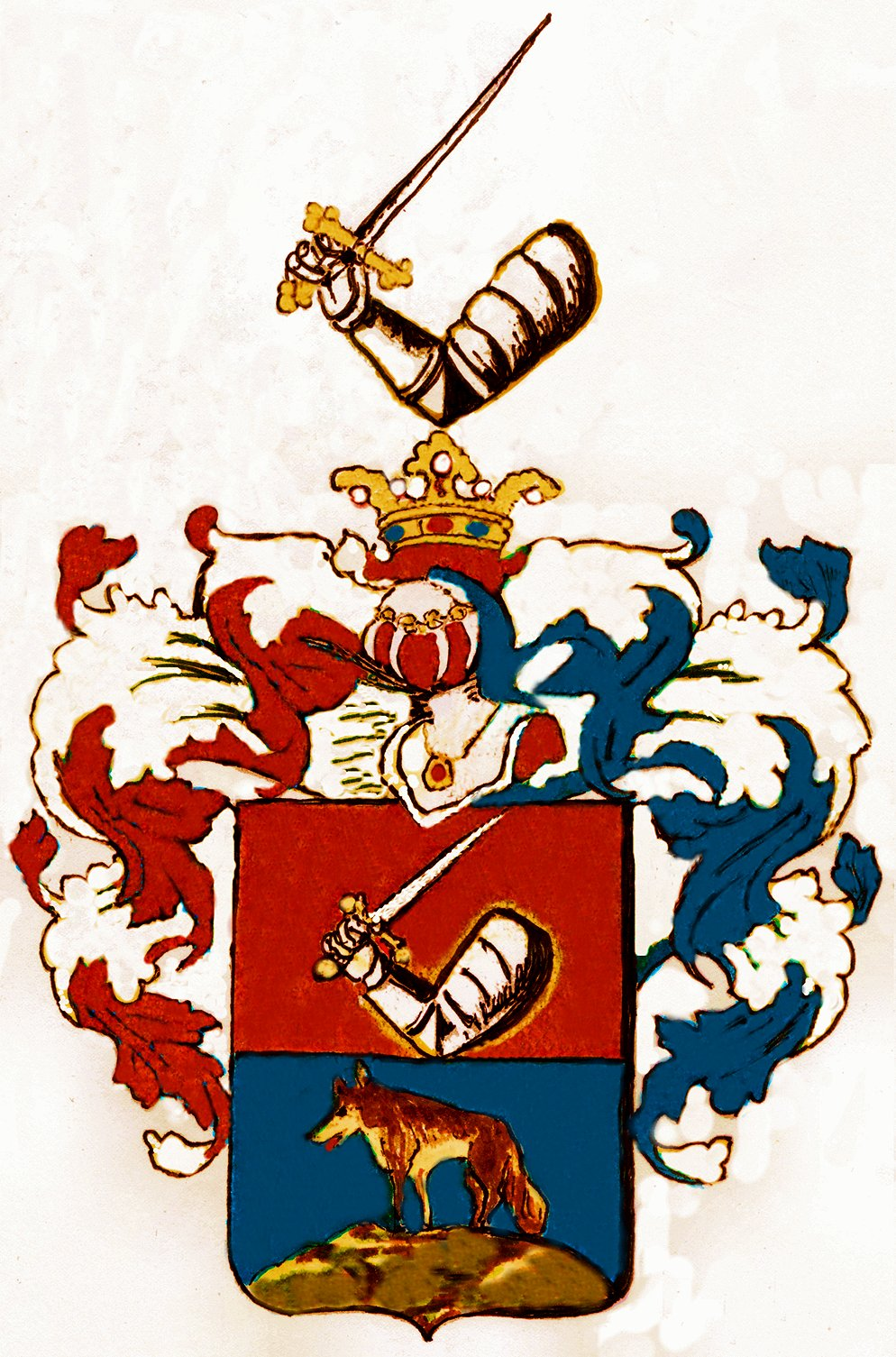 Wappen Lenk von Wolfsberg 1801, verliehen an Artillerie-Hauptmann Joseph Lenck und seine Nachfahren